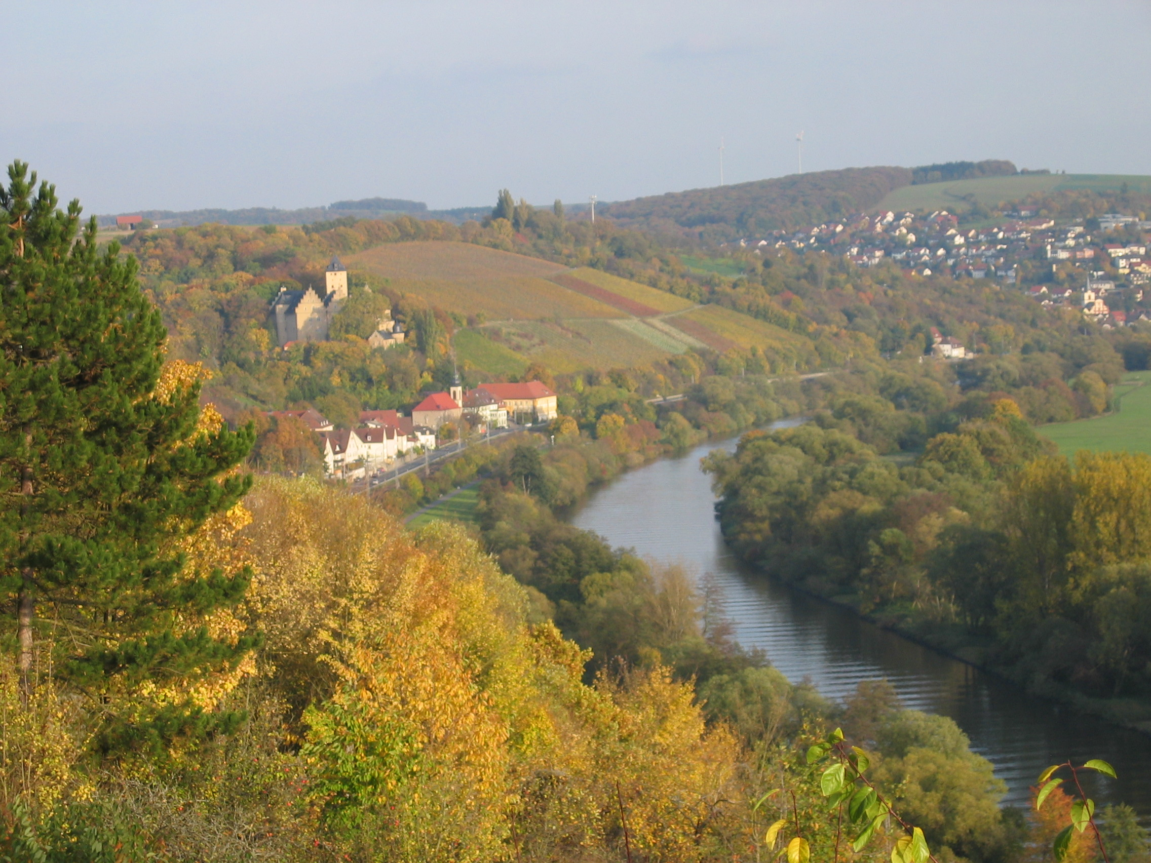 Blick von der Bismarckshöhe an der Mainleite auf Dorf und Schloß Mainberg